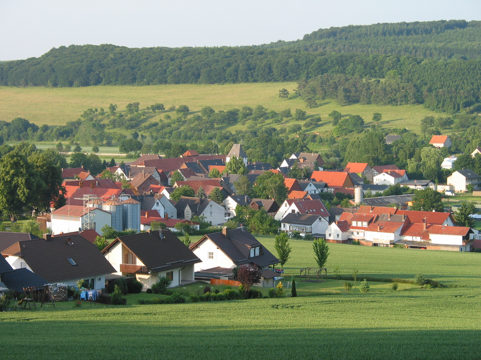 Blick vom Iberg auf den alten Ortskern von Welda , in der Mitte der Kirchturm von St. Kilian